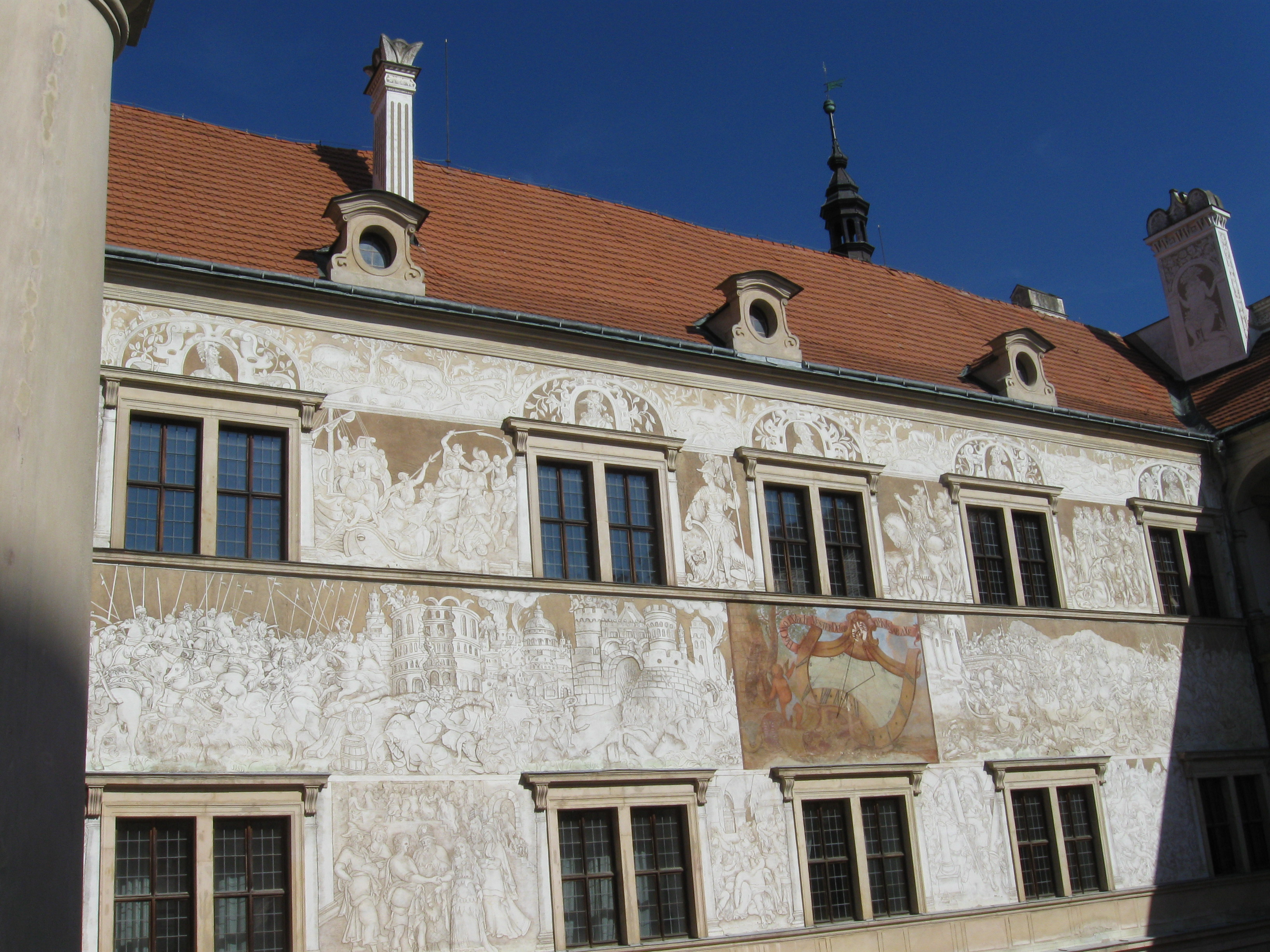 Zámek Litomyšl